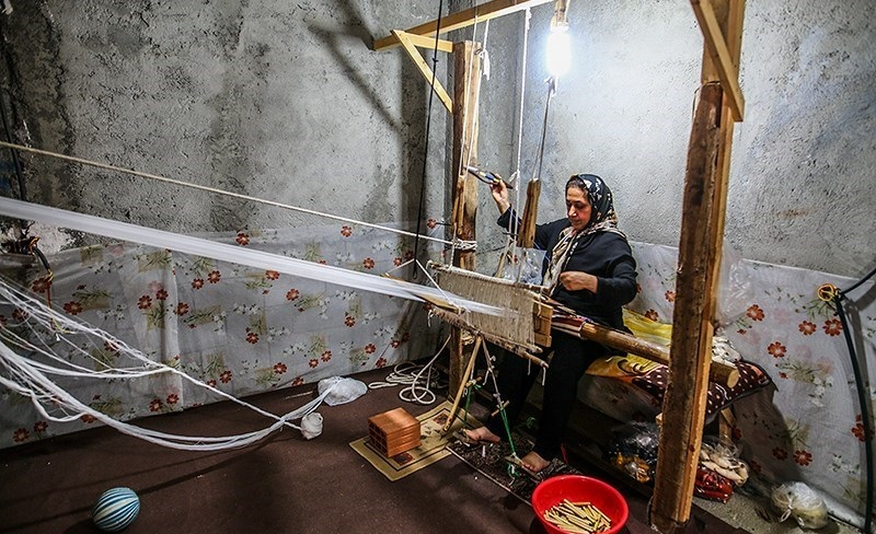 جاجیم بافی در ایران